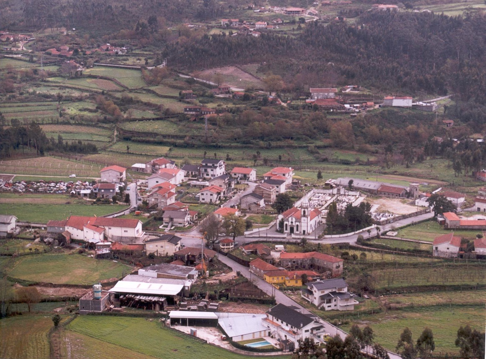 Vista aérea da freguesia de Sobrosa, concelho de Paredes, Portugal